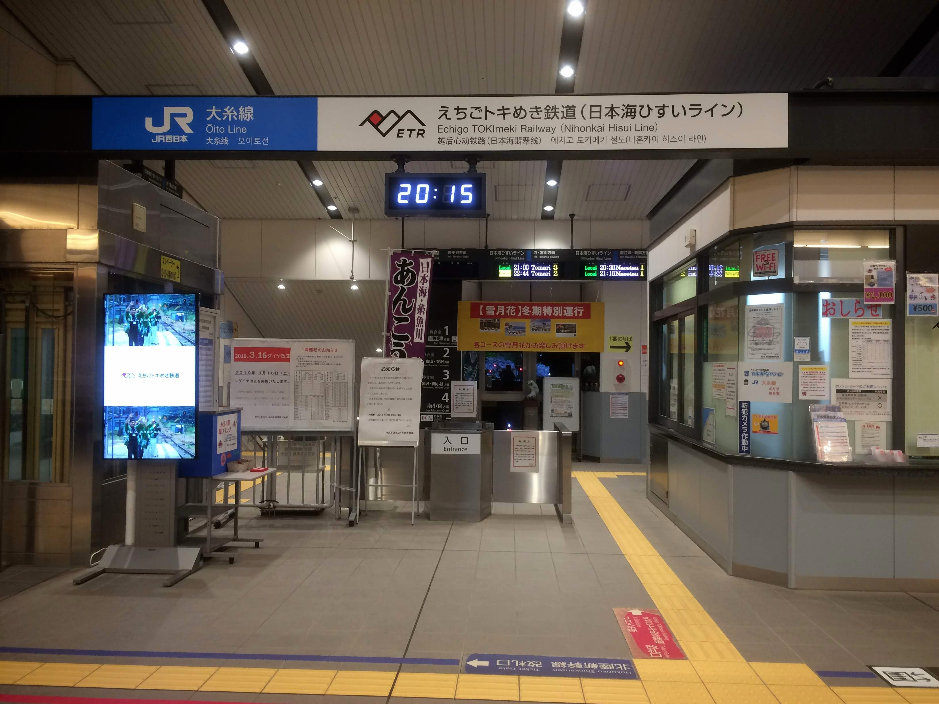 ETR糸魚川駅の改札口